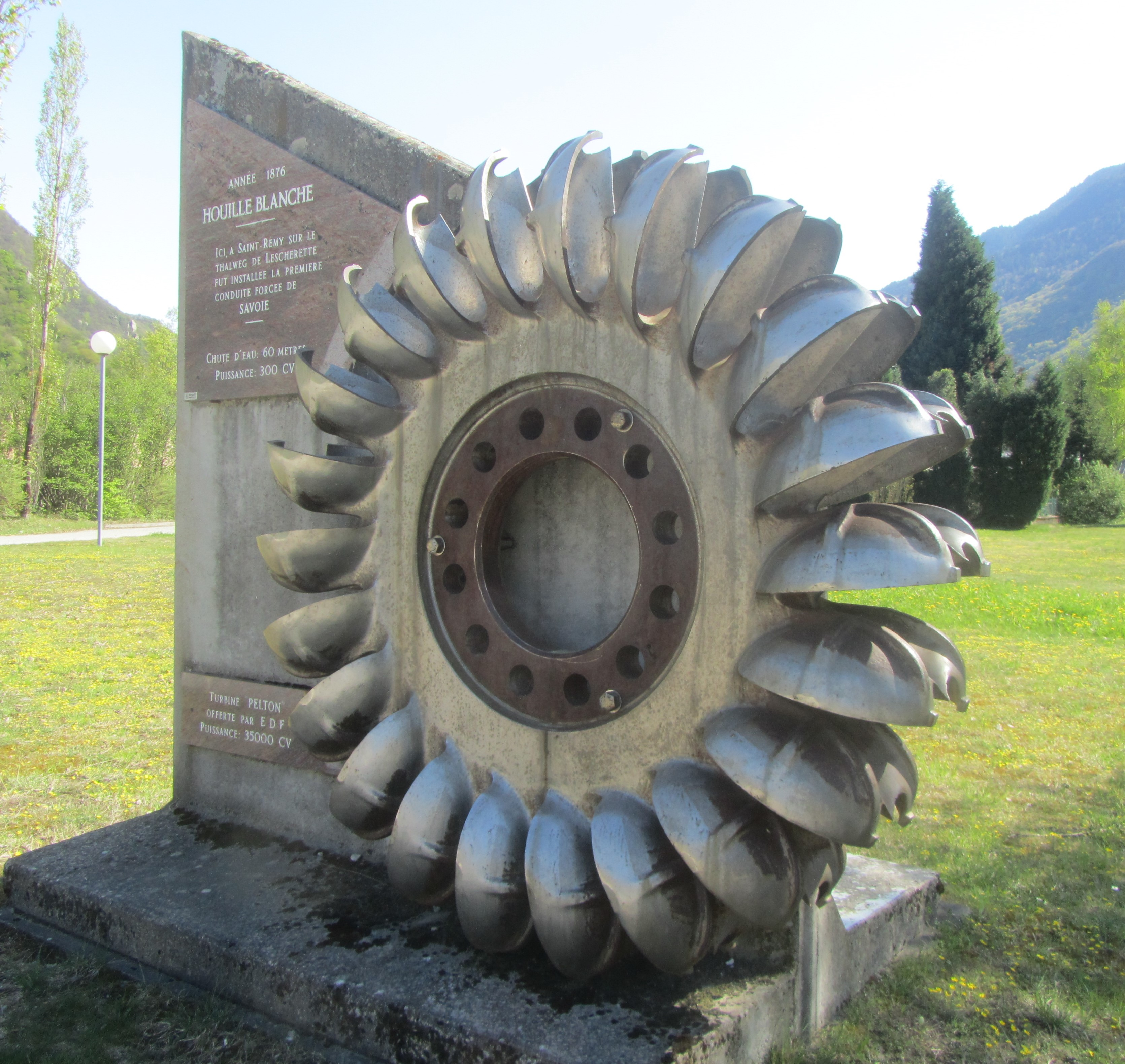 Turbine Pelton marquant la naissance de la houille blanche en Maurienne.